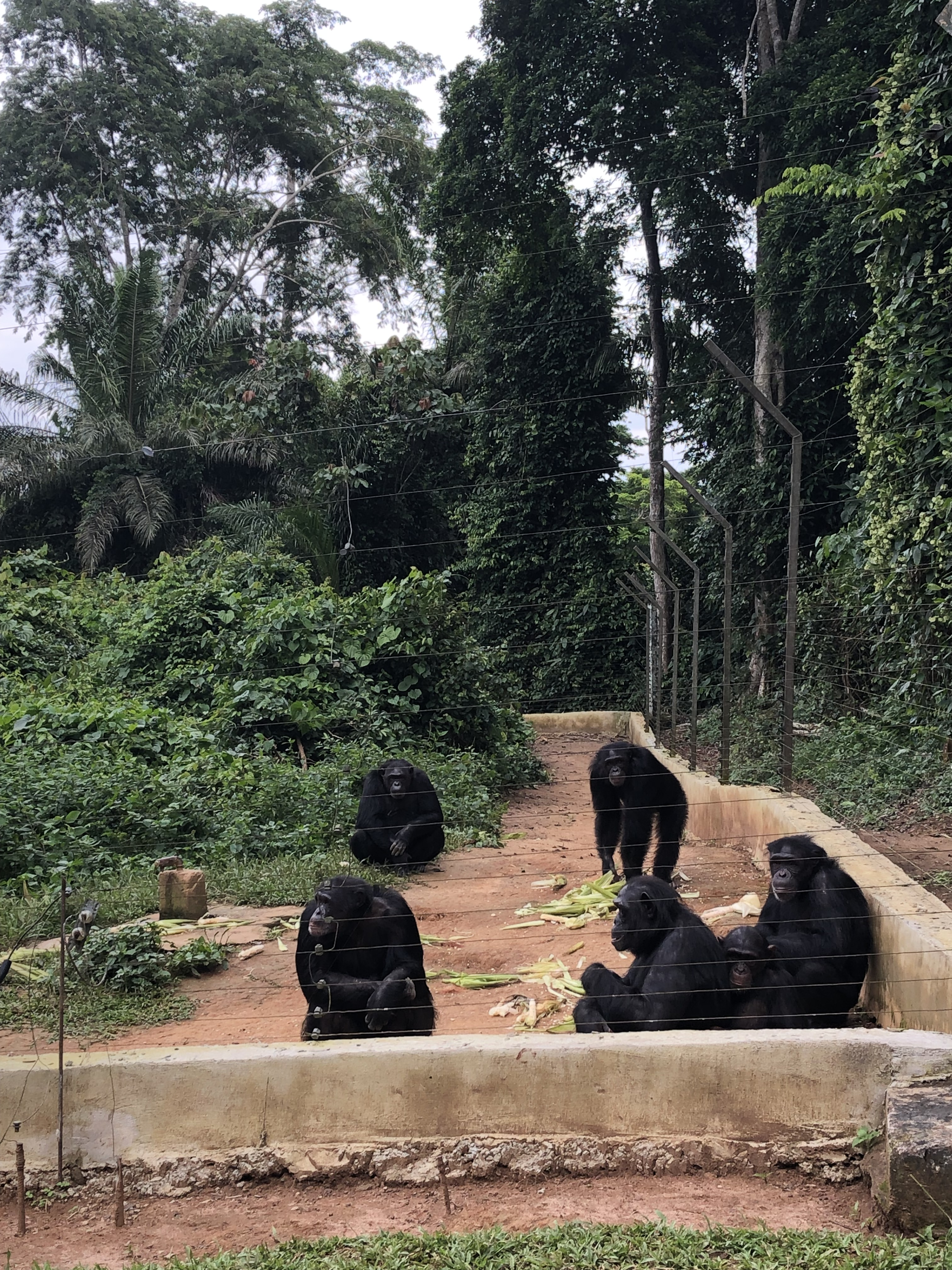 Аҧсшәа: Park de la Mefou